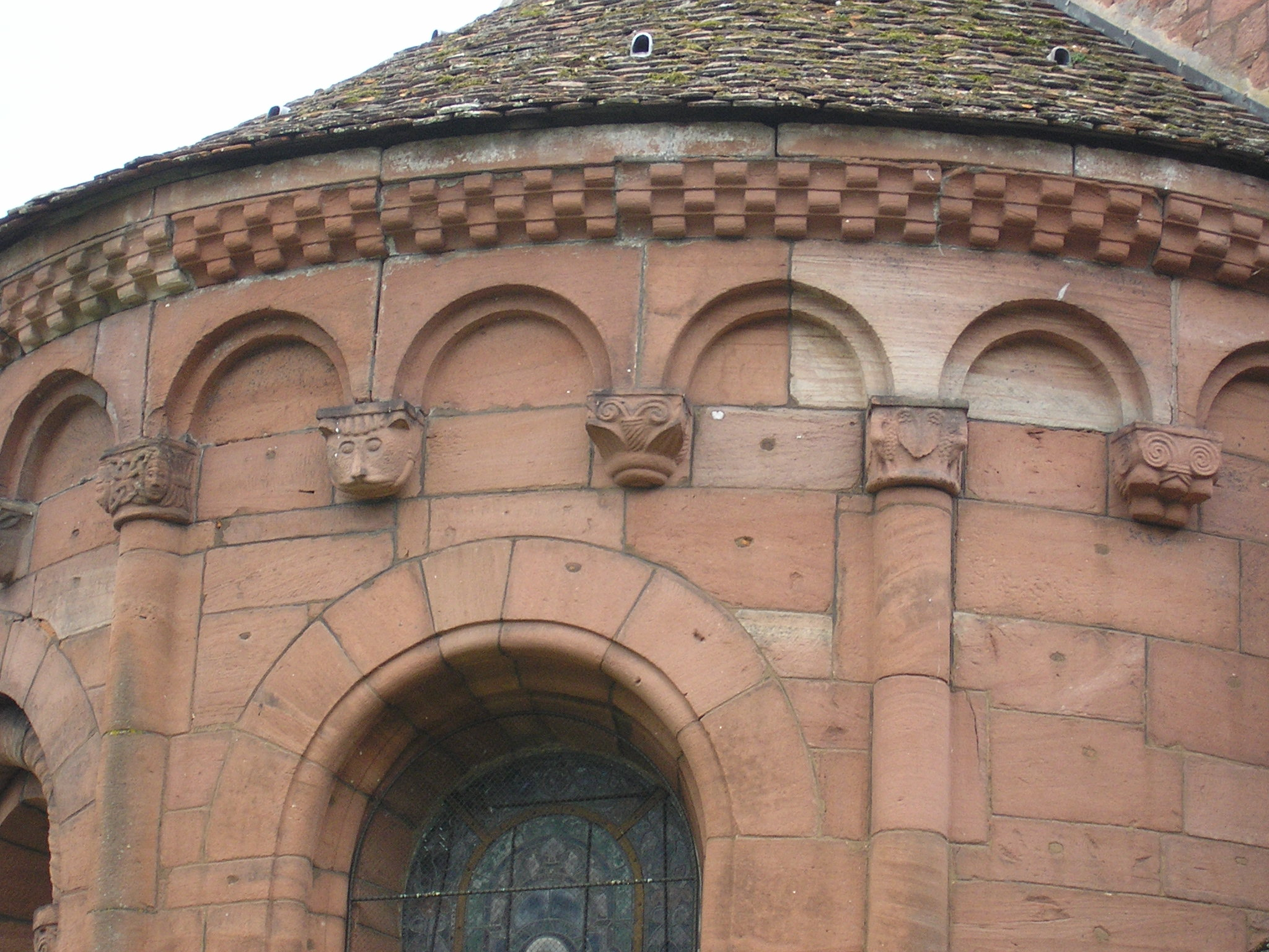 Détail du chevet roman de St Jean Baptiste à St Jean Saverne (Bas-Rhin)